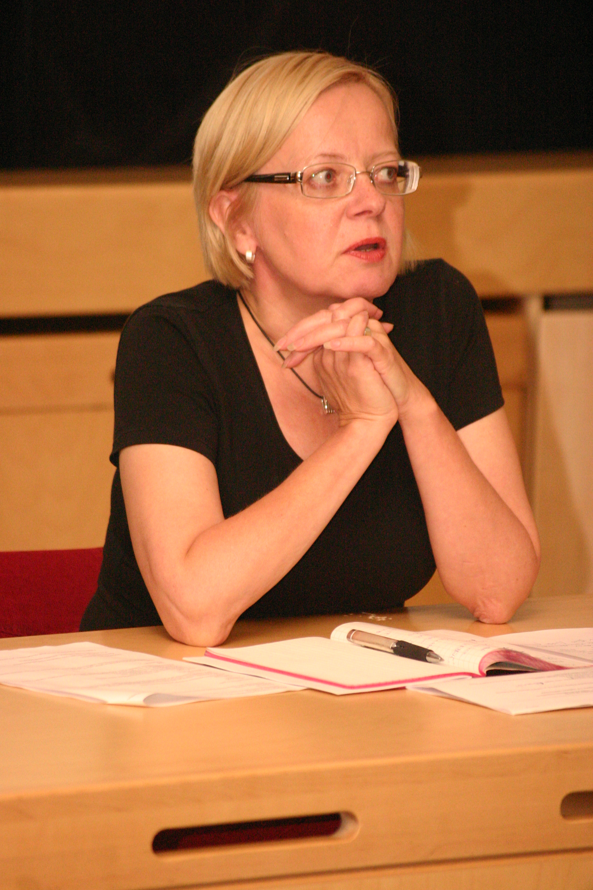 Sirpa Puhakka Kiljavalla 2007 Sirpa Puhakka Kiljavalla 2007